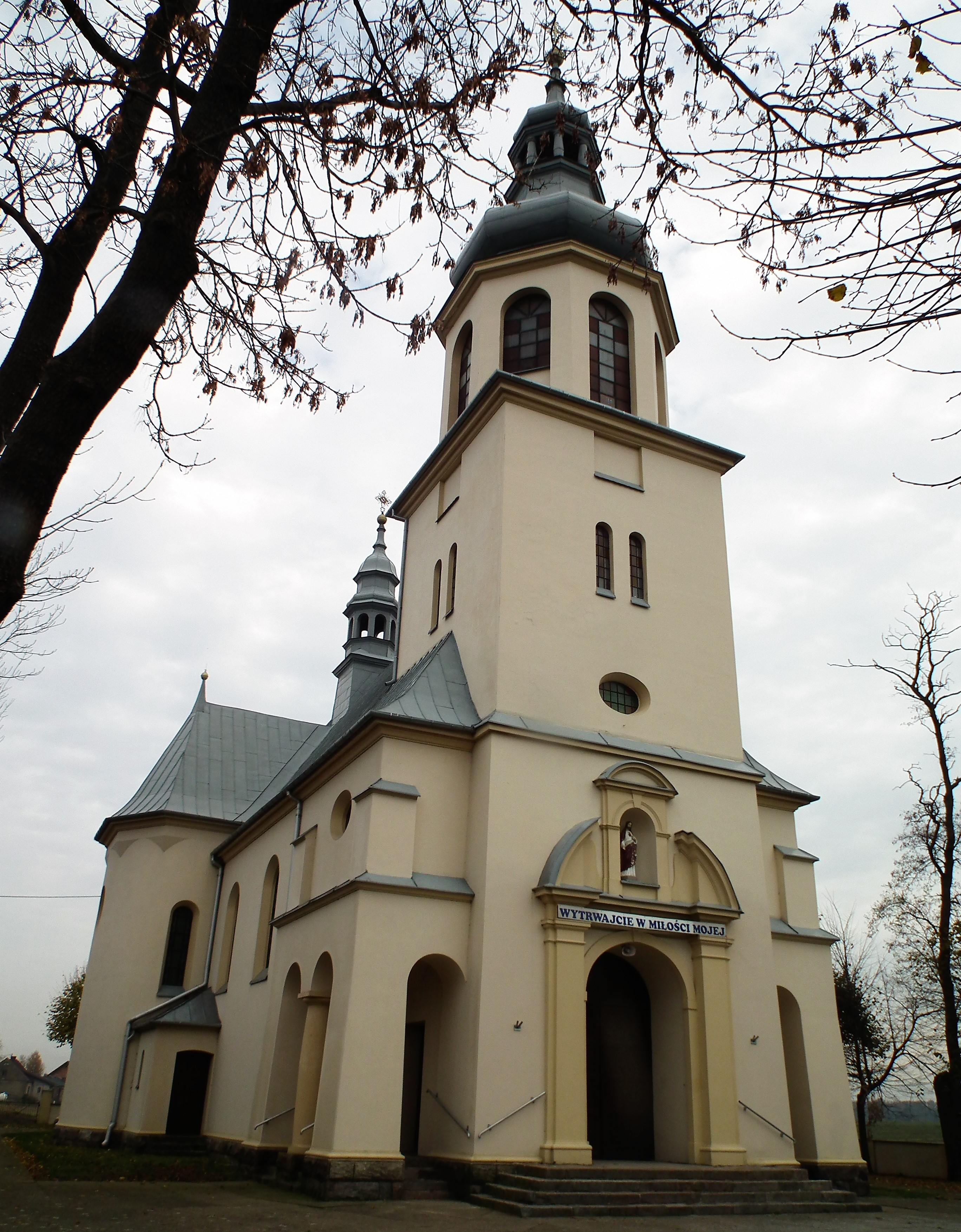 Kościół Najświętszego Serca Pana Jezusa w Błoniu koło Łowicza.